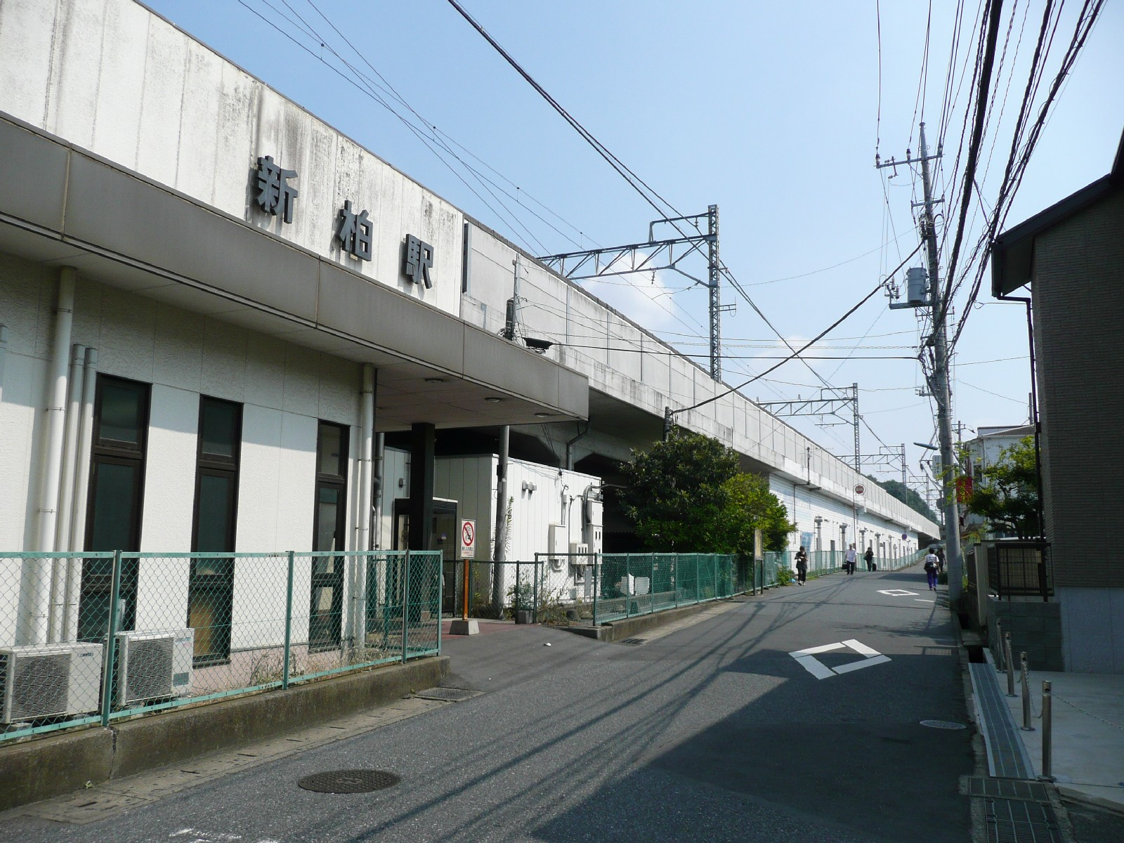 新柏駅西口